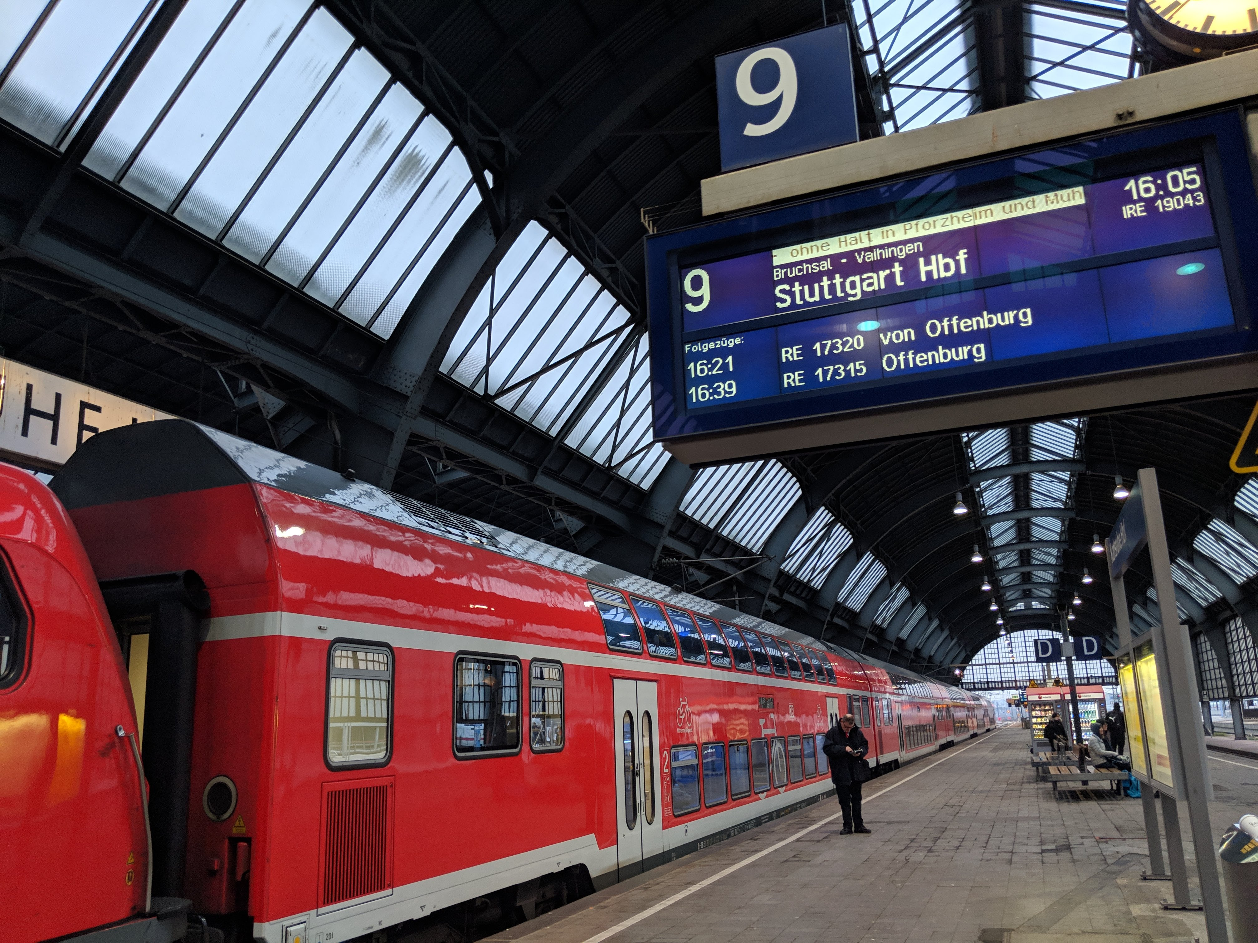 Ein Doppelstock-Interregio-Express am Karlsruher Hauptbahnhof